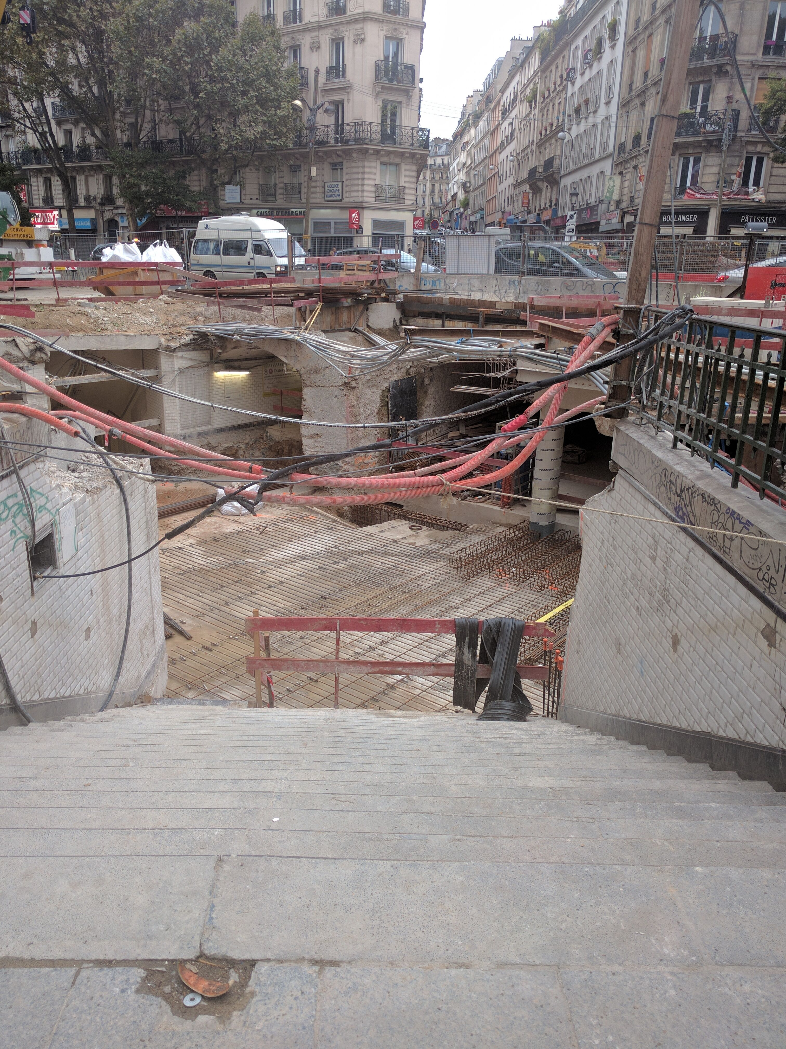 La station Château Rouge vue depuis son entrée principale, pendant les travaux d'agrandissement, en août 2016. Photo déjà publiée sur ce forum